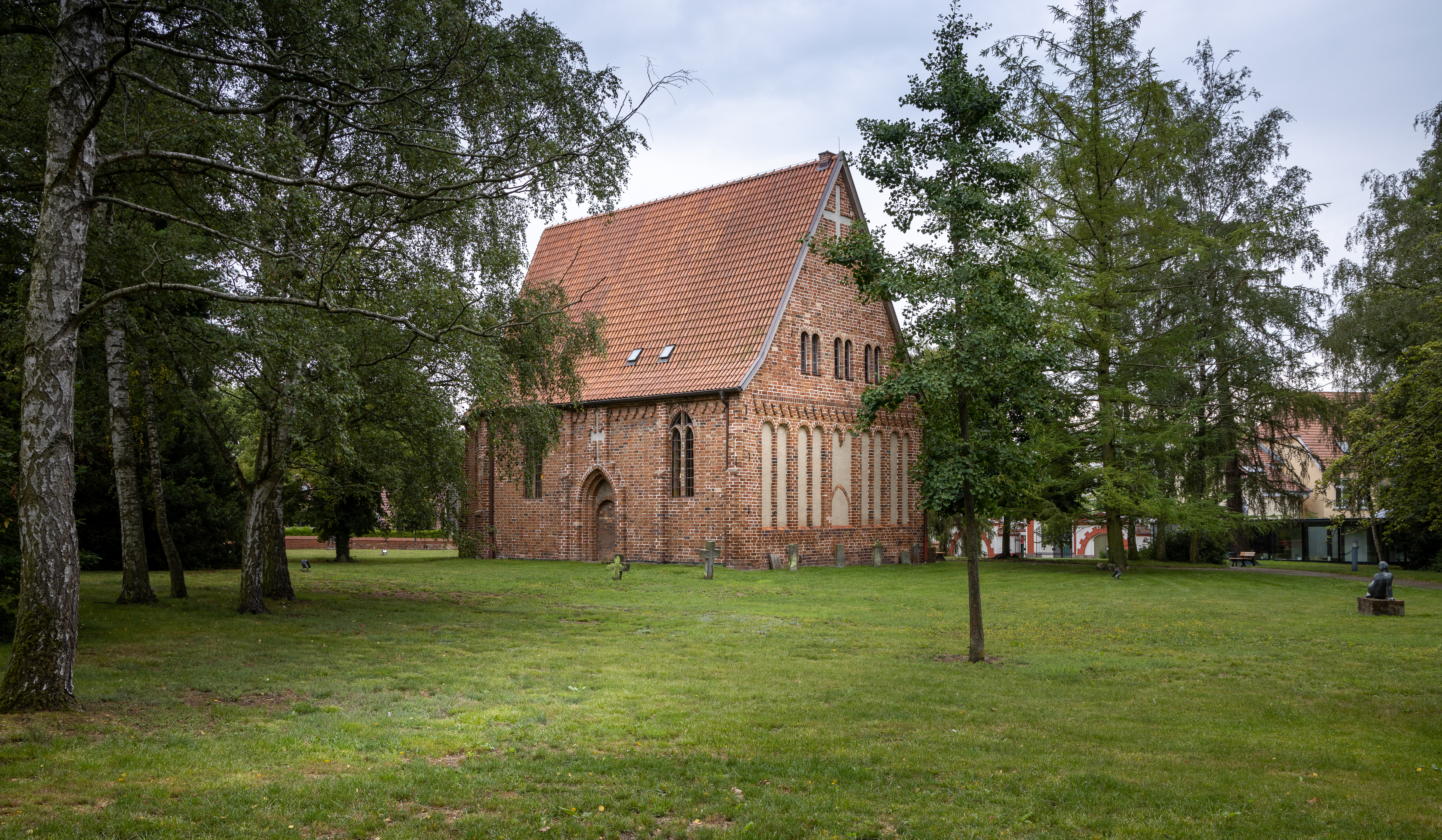 Gertruden-Kapelle, Barlach Stiftung, Güstrow, Mecklenburg-Vorpommern